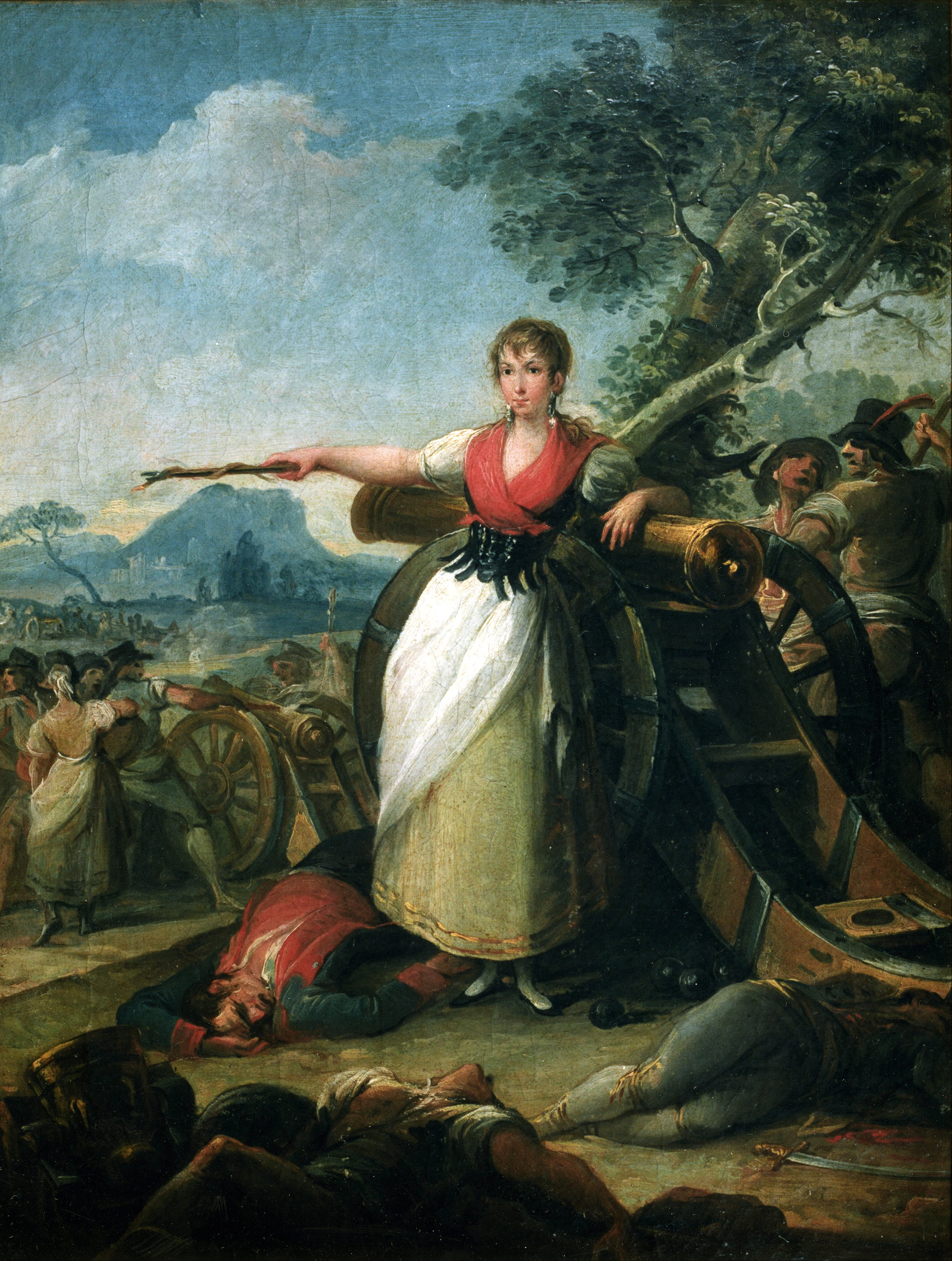 La obra representa a la heroína española Agustina de Aragón (1786-1857).